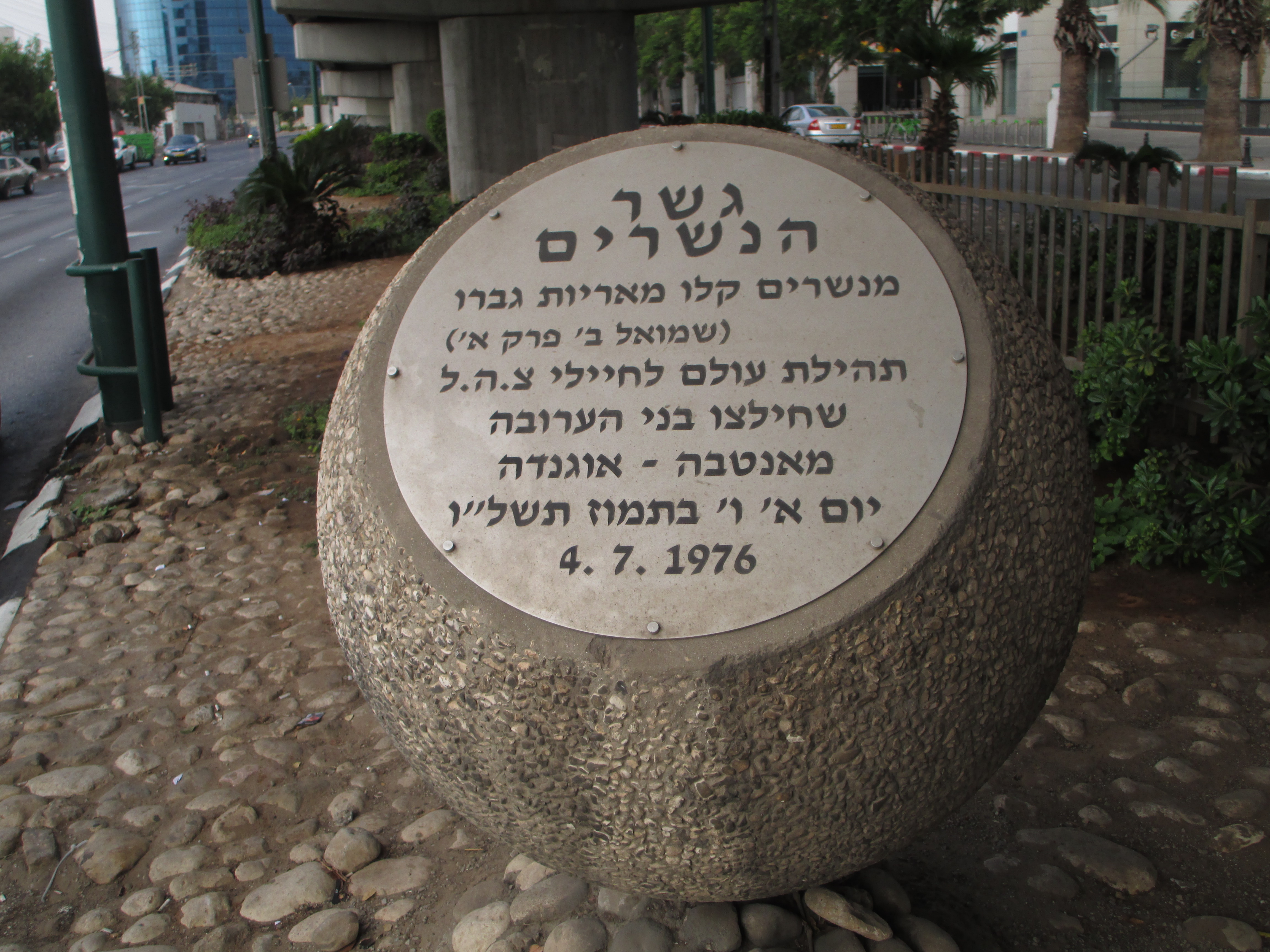 לוח הנצחה למבצע אנטבה מתחת לגשר הנשרים בתל אביב